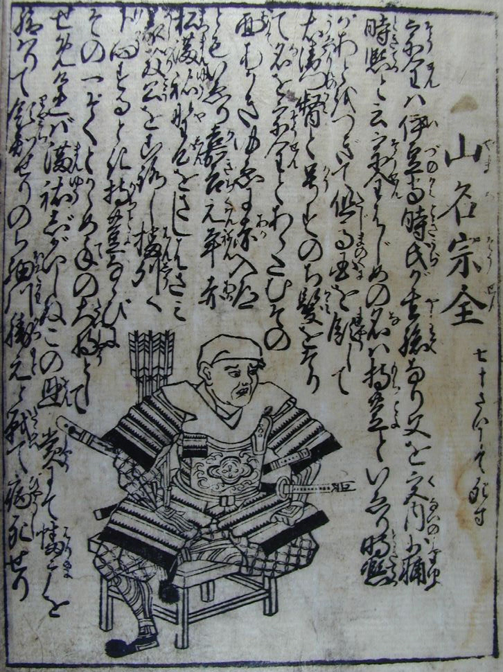 yamana_souzen